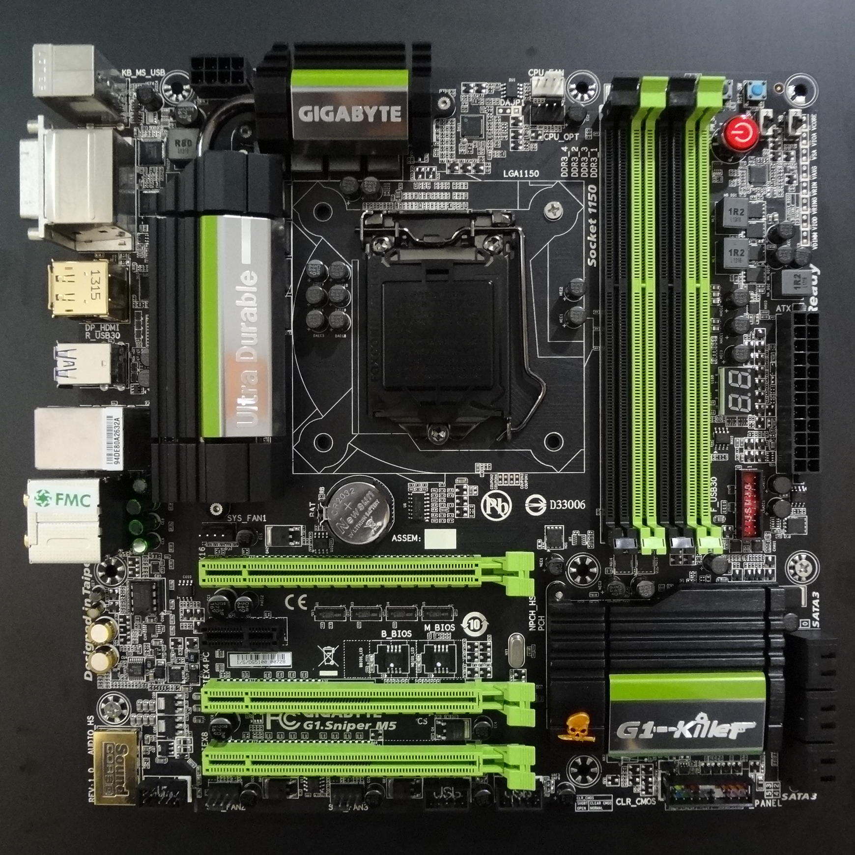 技嘉主機版G1.Sniper M5